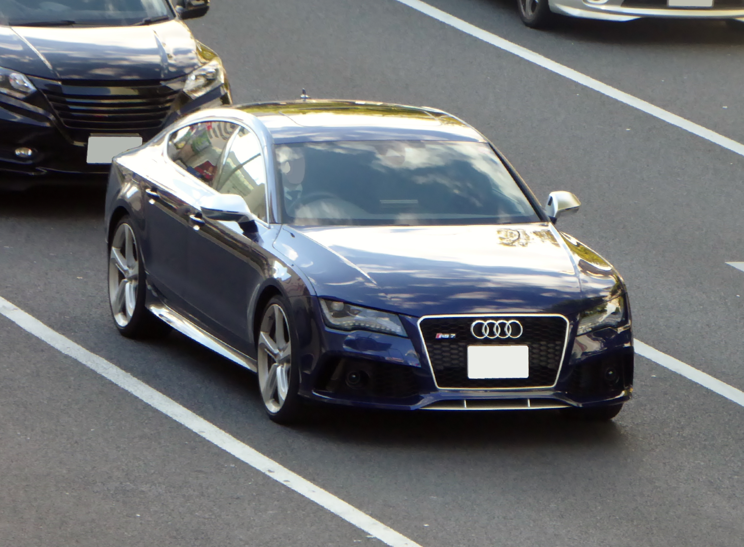 アウディ・RS7をフロントから撮影。